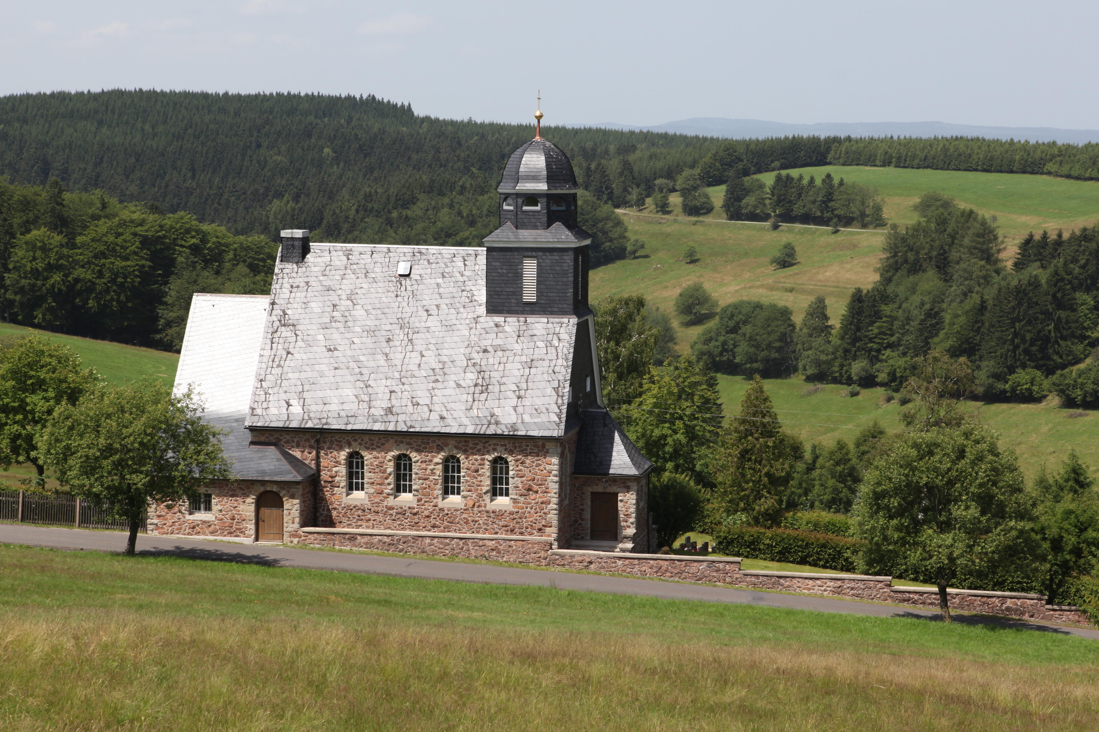 Evangelische Kirche Christuskirche in Waffenrod, OT von Eisfeld, Thüringen